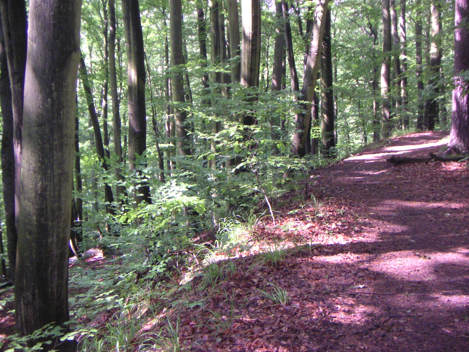 Szczeciński Park Krajobrazowy "Puszcza Bukowa", rezerwat przyrody "Bukowe Zdroje", wzgórze Chojna, zniszczona korona grodziska (wschodni skraj)